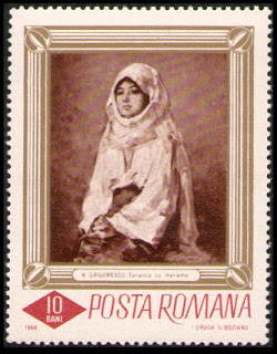 Țăranca cu maramă - timbru -poștal